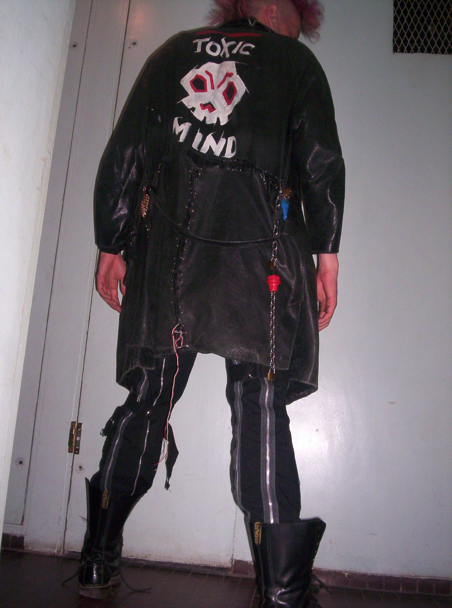 Exemple de tenue punk / sample punk's look